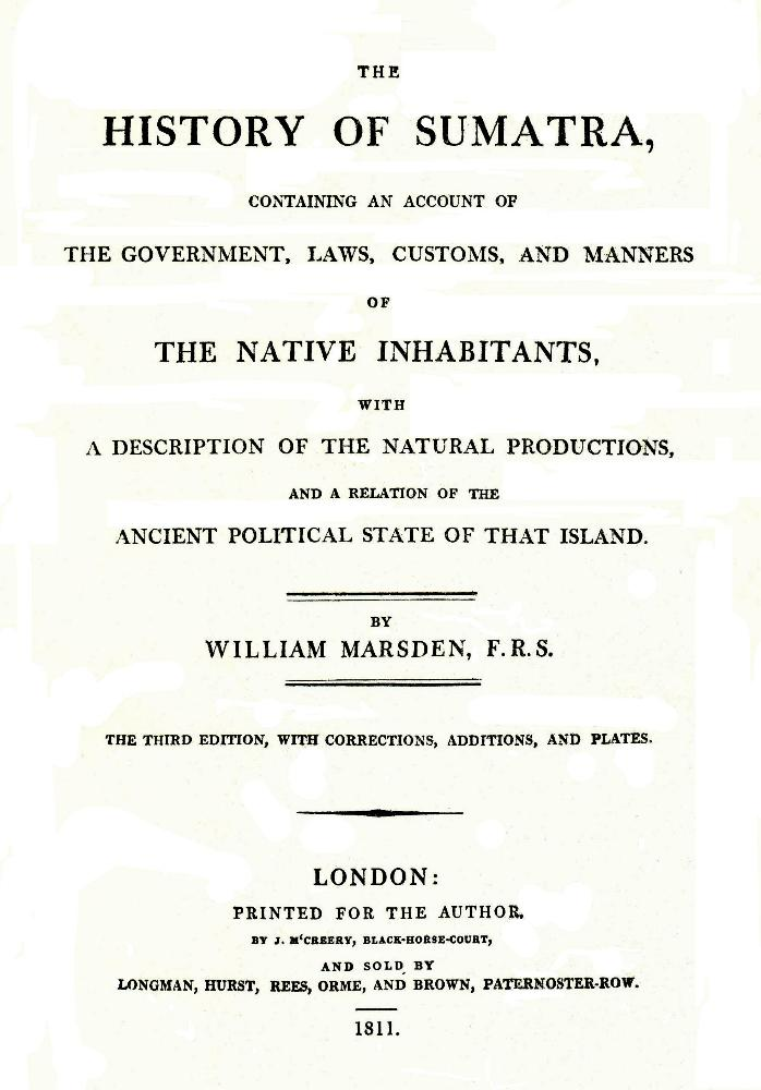 William Marsden: The History of Sumatra. Titel der dritten Auflage 1811